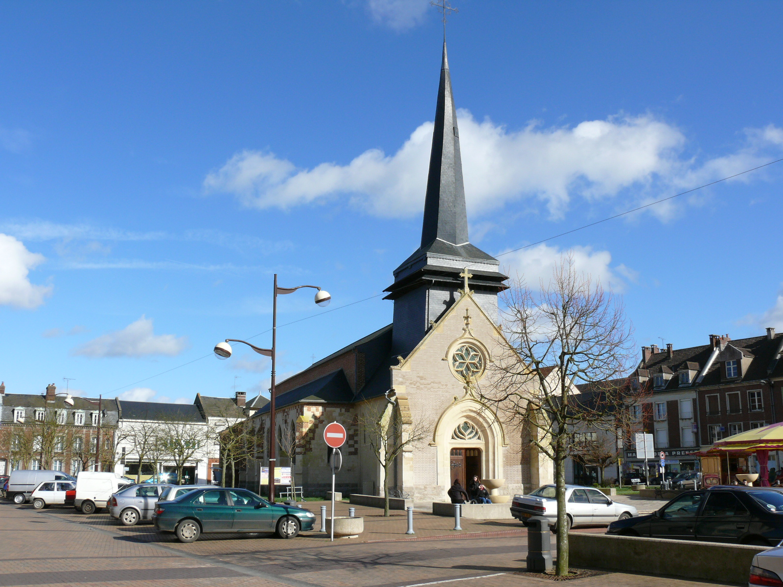 GRANDVILLIERS (Oise) : L'Église Saint-Gilles et la Place